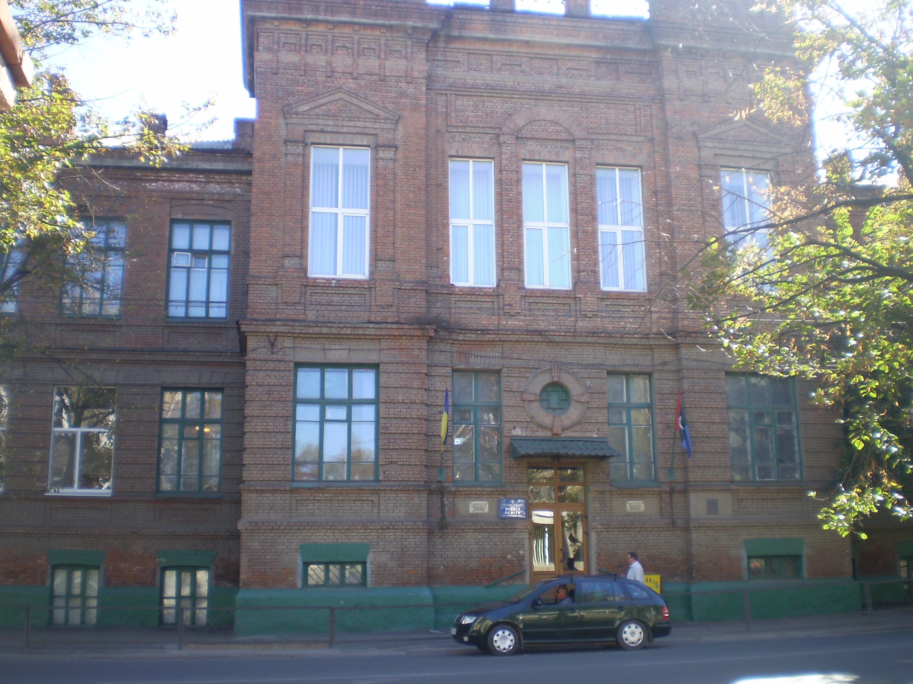 Женская гимназия им. Екатерины Великой